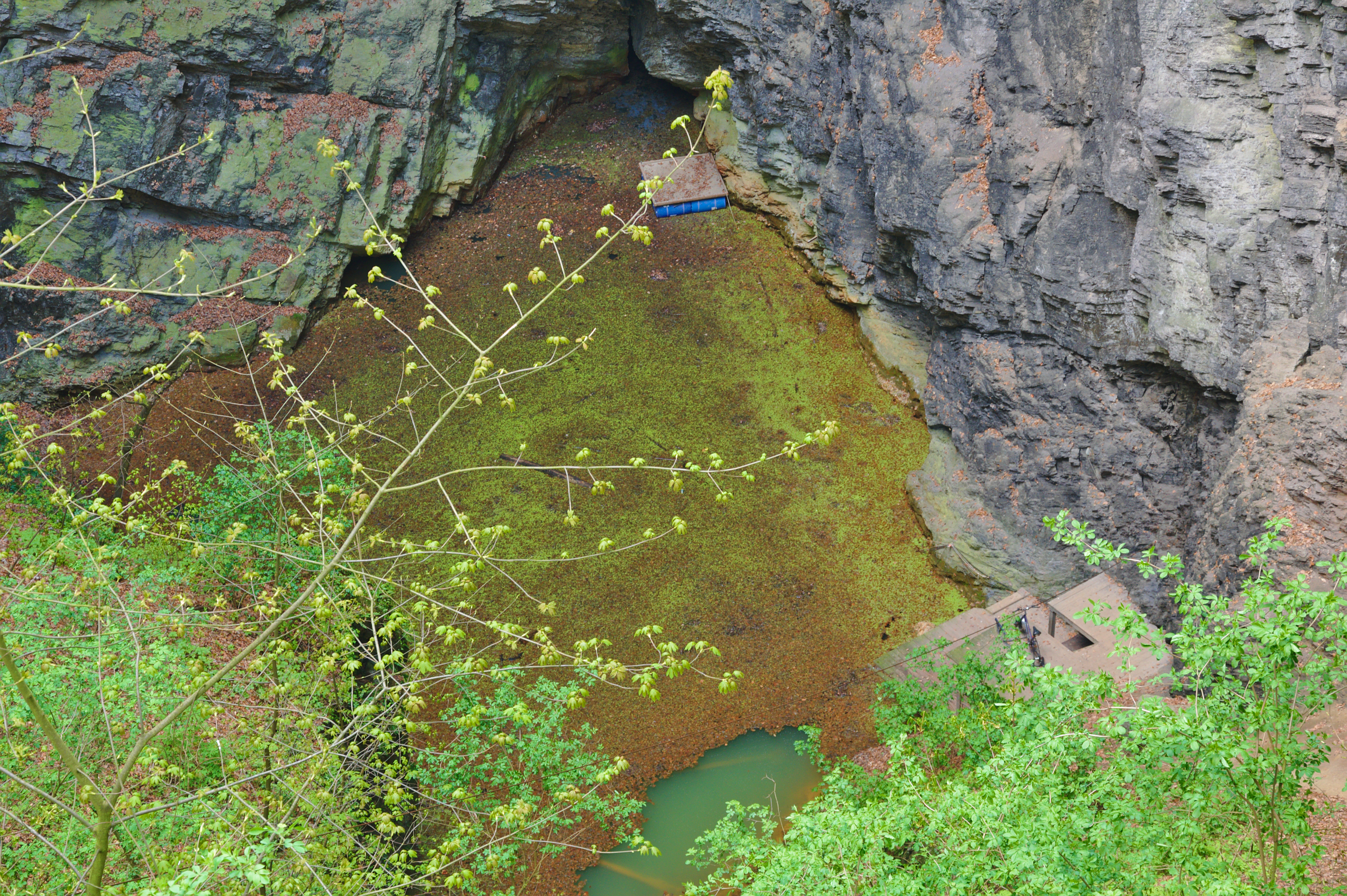 Hranická propast, národní přírodní rezervace Hůrka u Hranic, okres Přerov